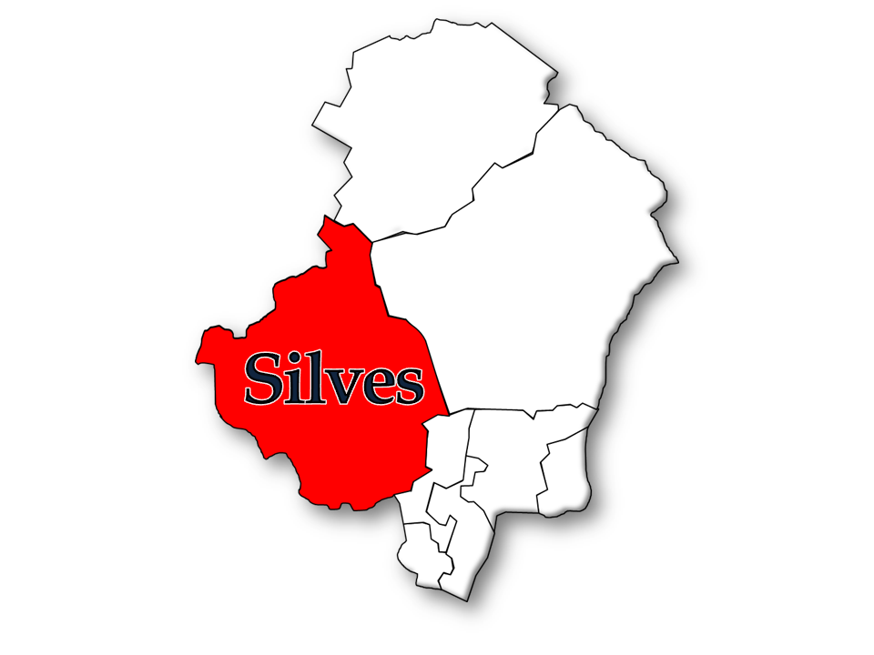 Censos 1864/2011